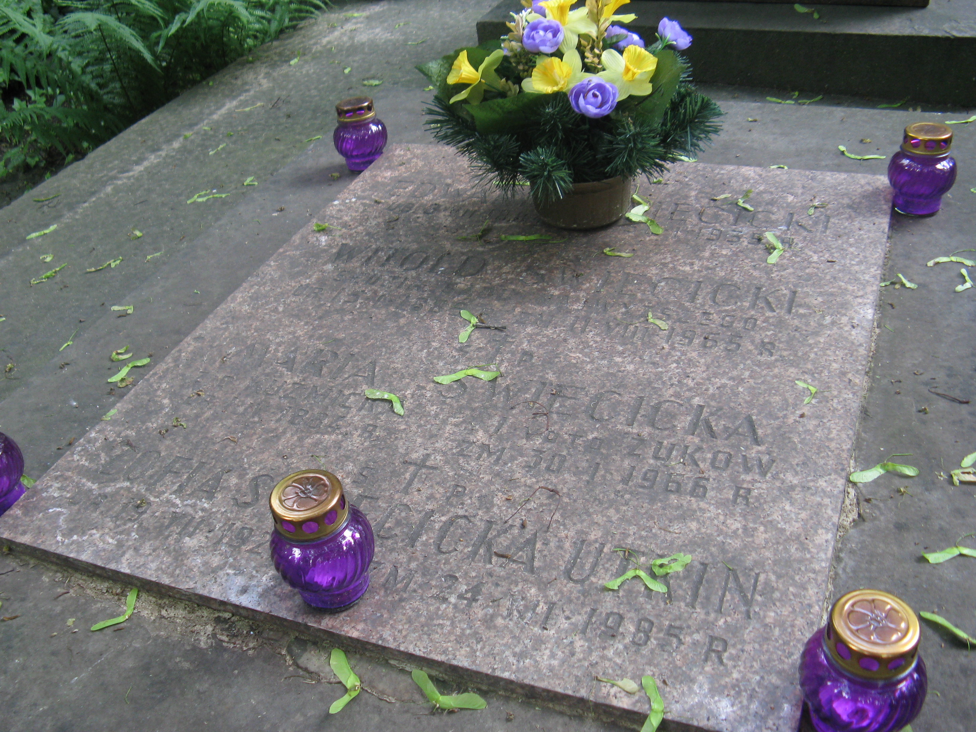 Grób Witolda Święcickego na Cmentarzu Powązkowskim